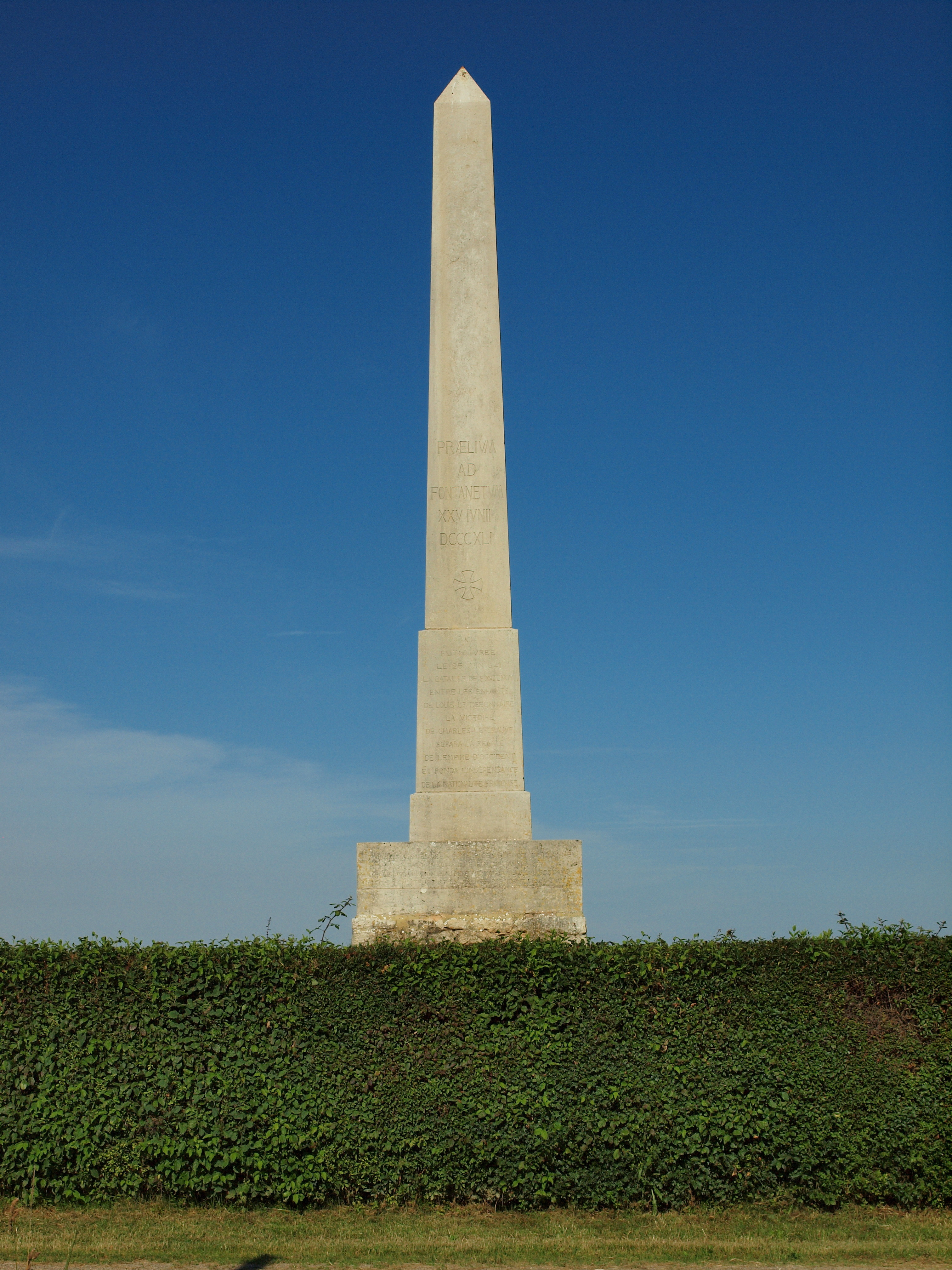 Category:Obélisque de Fontenoy-en-Puisaye (Yonne, France)